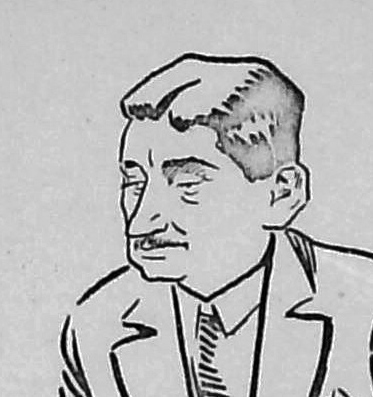 dr Władysław Tempka poseł na Sejm RP (karykatura wycięta z grafiki Zygmunta Skwirczyńskiego.